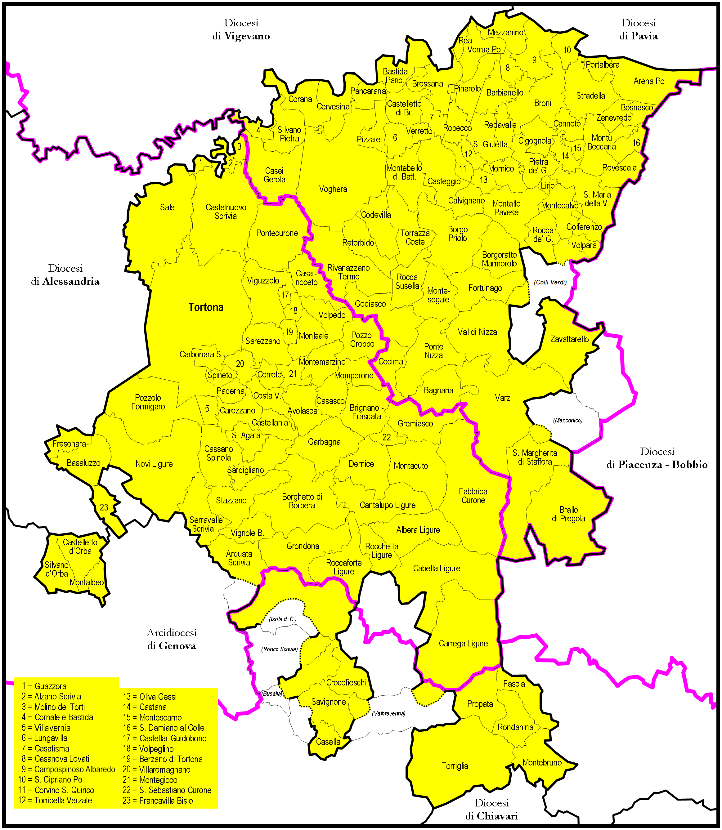 Mappa della Diocesi di Tortona